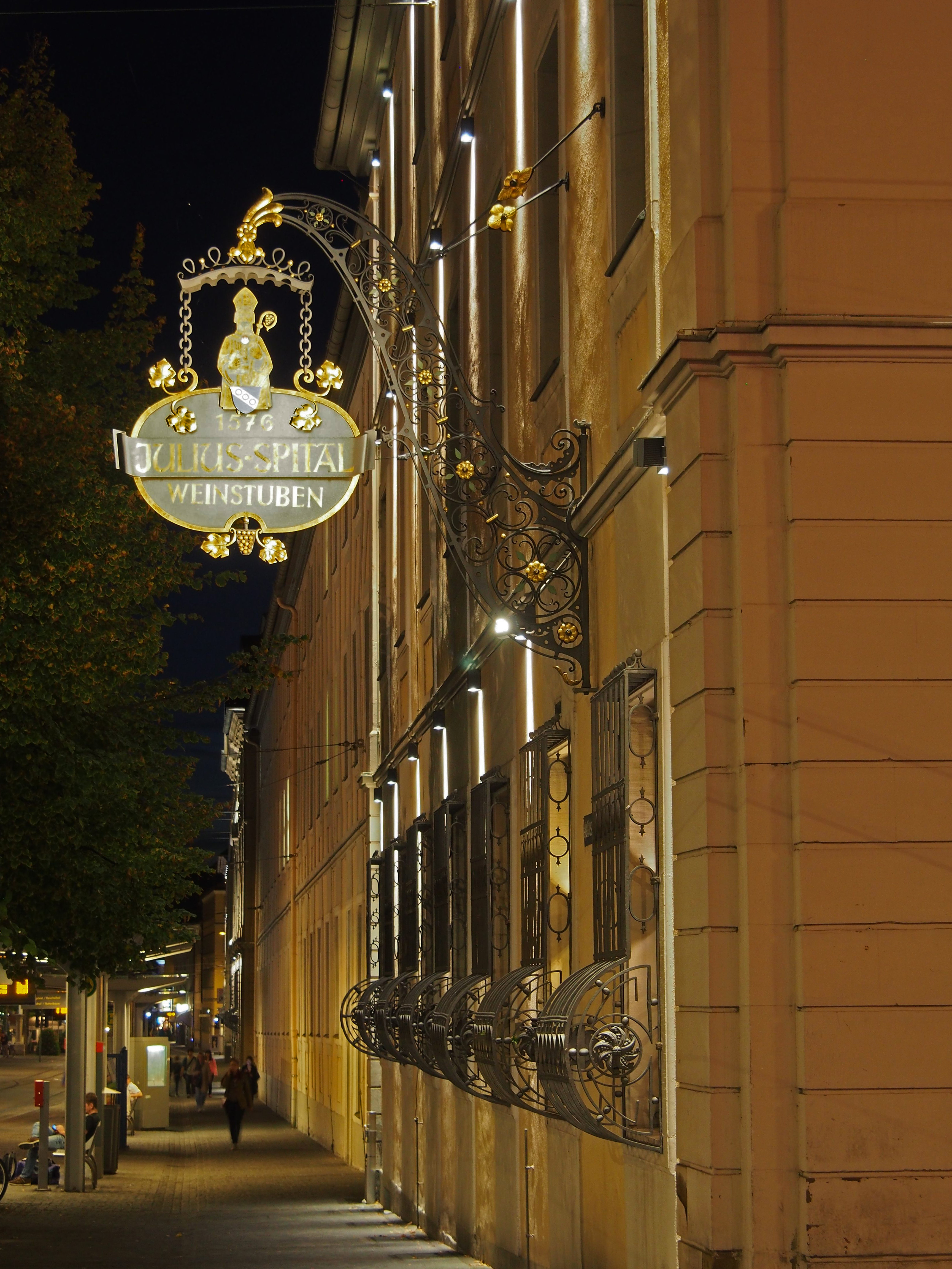 Wirtshausschild an der Weinstube des Juliusspitals, Würzburg